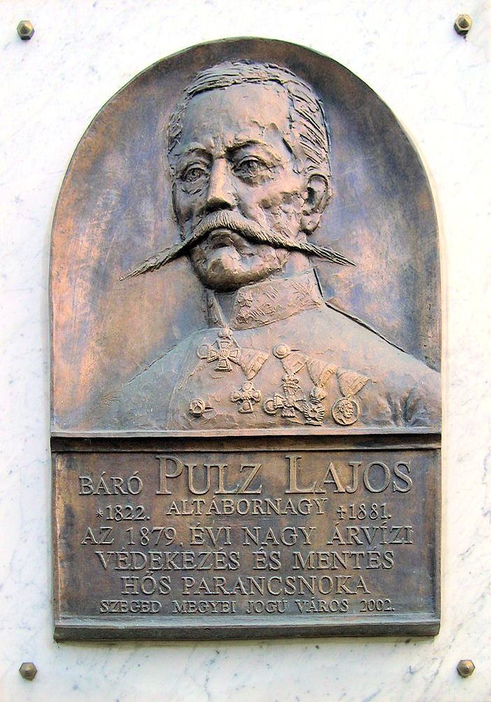 Pulz Lajos-emléktábla Szegeden, a róla elnevezett utcában. Lapis András alkotása (2002)